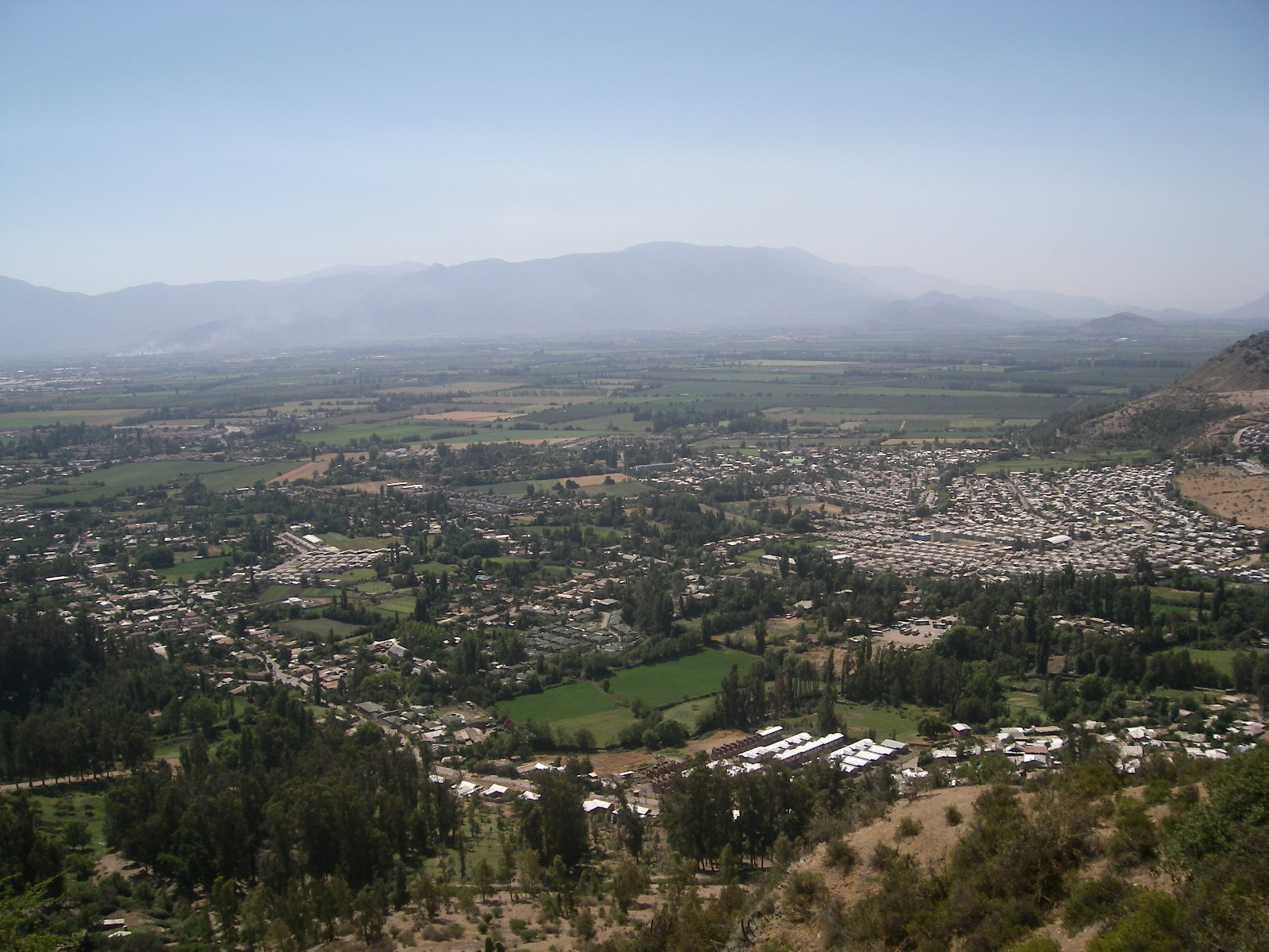 Cerro San Juan.